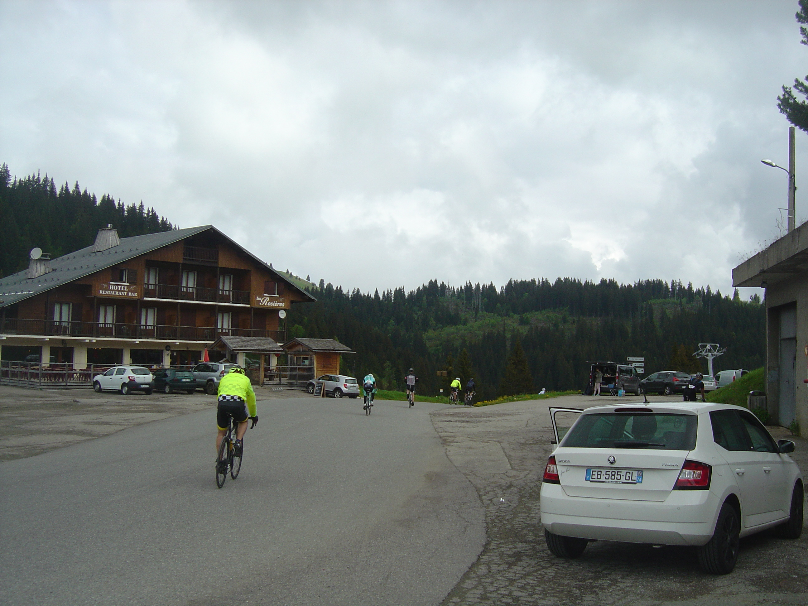 Le col de la Croix Fry (1467m) le jour de la Time Megève Mont Blanc 2016